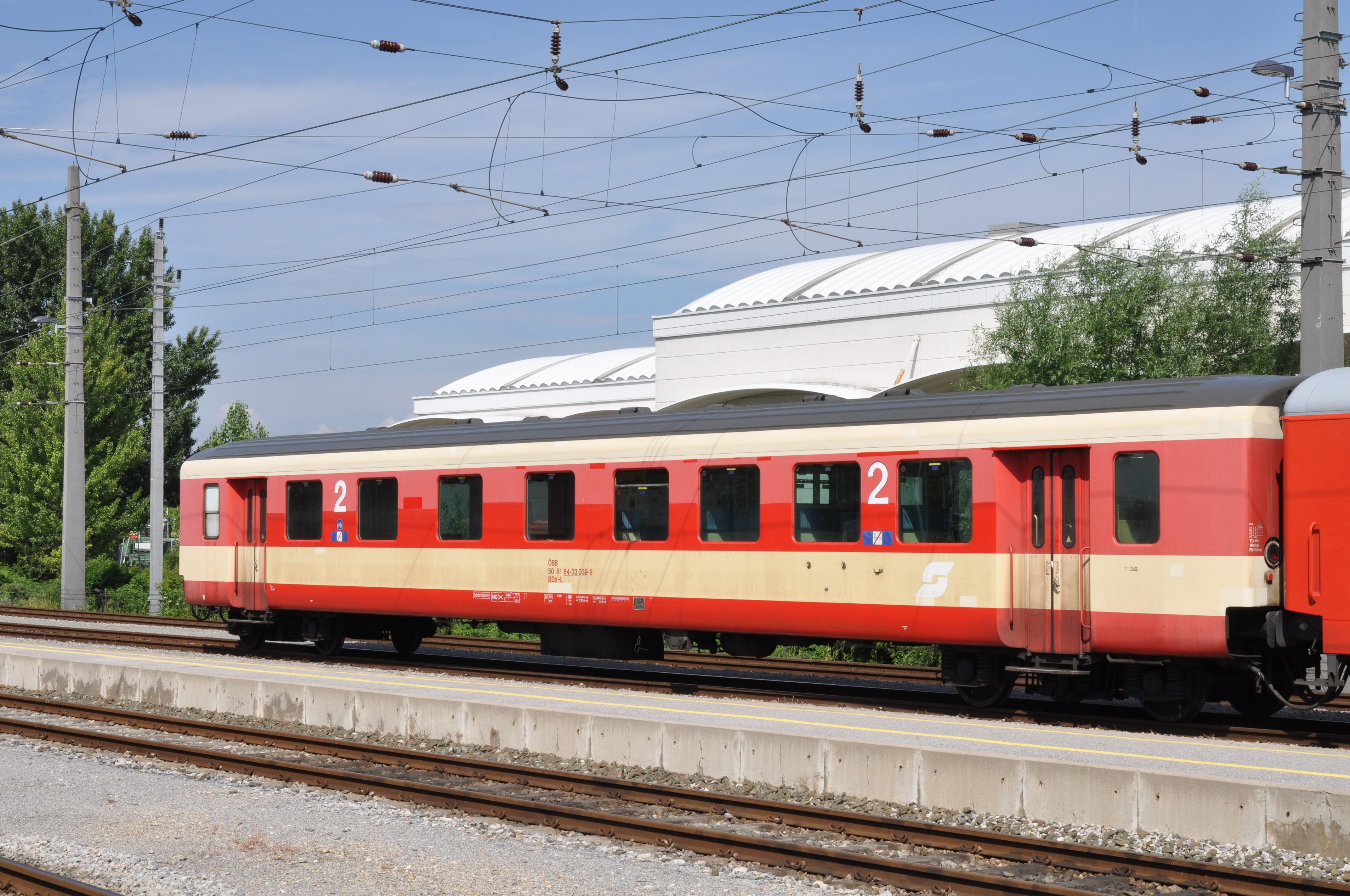 Schlierenwagen mit Mehrzweckabteil BDp-l 84-33 039-9 am Bahnhof Neusiedl am See